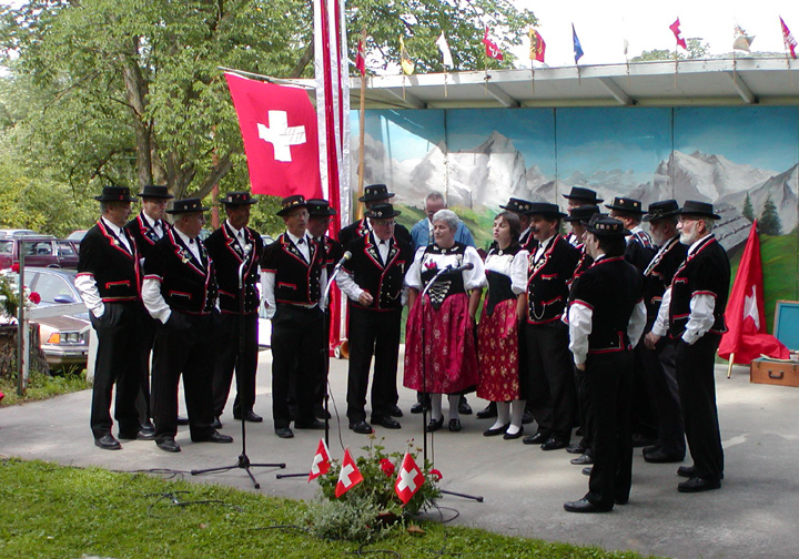 Noonemool s'Jodelchoerli